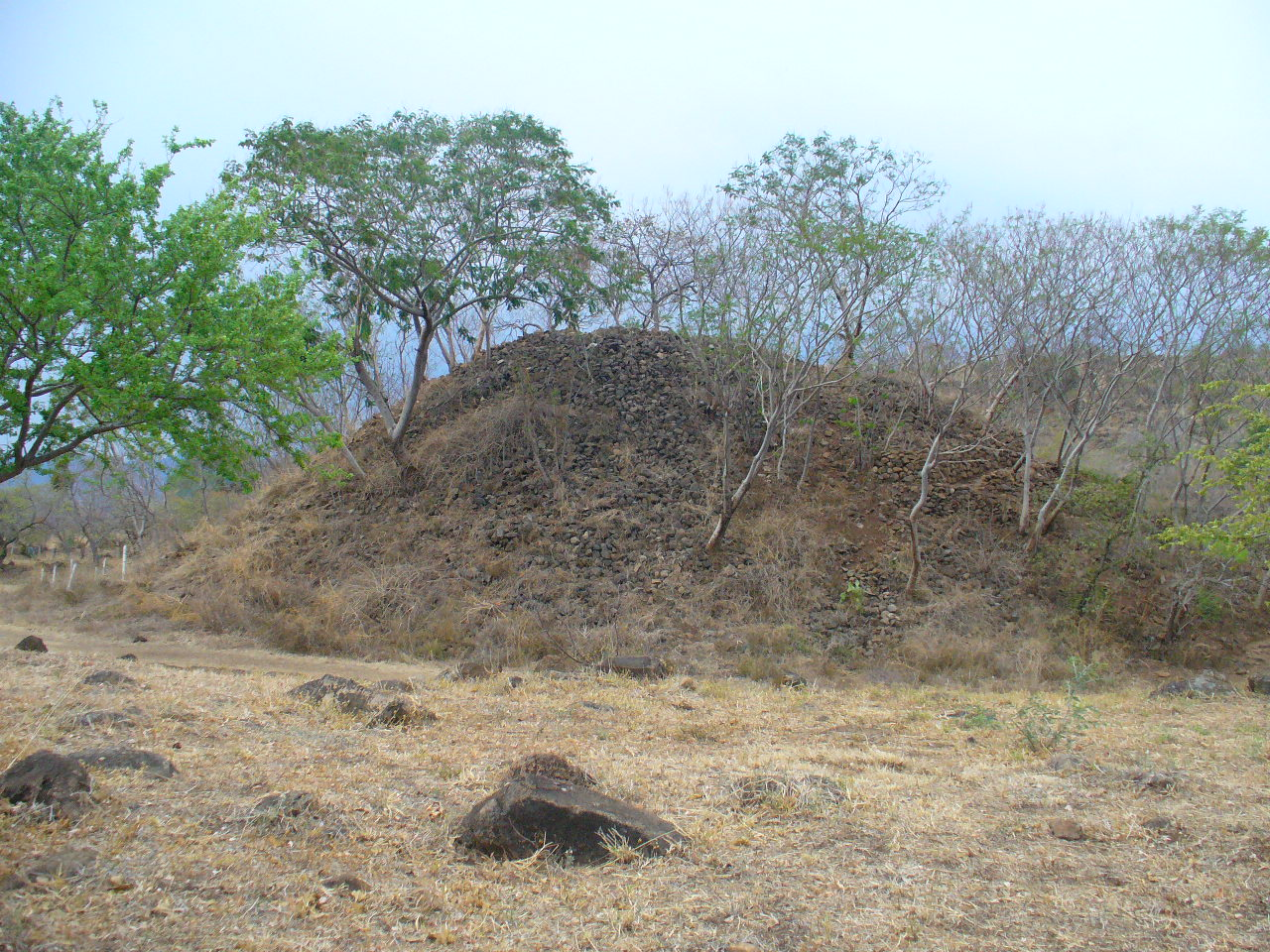 Imagen de los Guachimontones, Teuchitlàn, Jalisco, Mèxico.